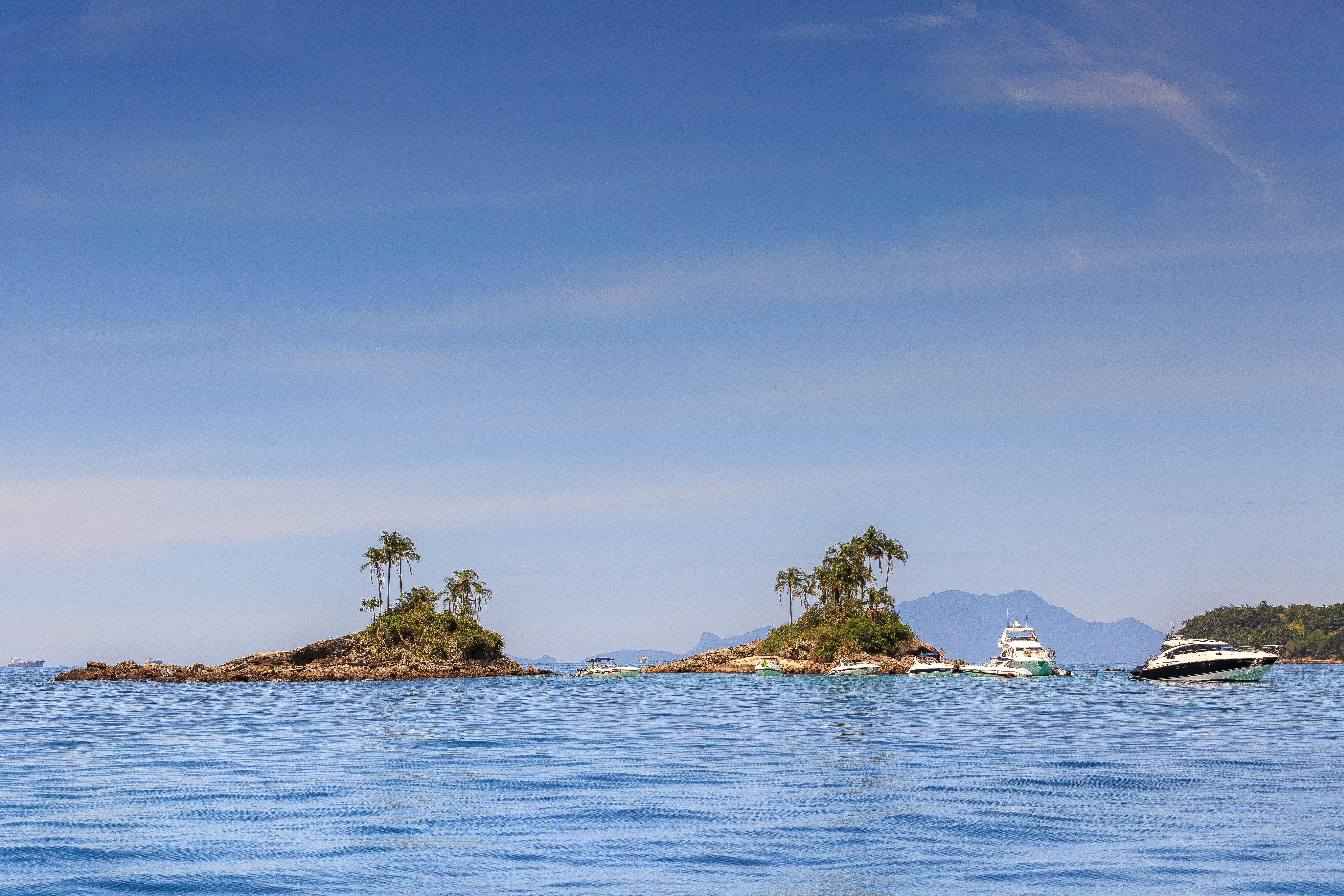 Ilha Botinas localizadas na cidade de Angra dos Reis.